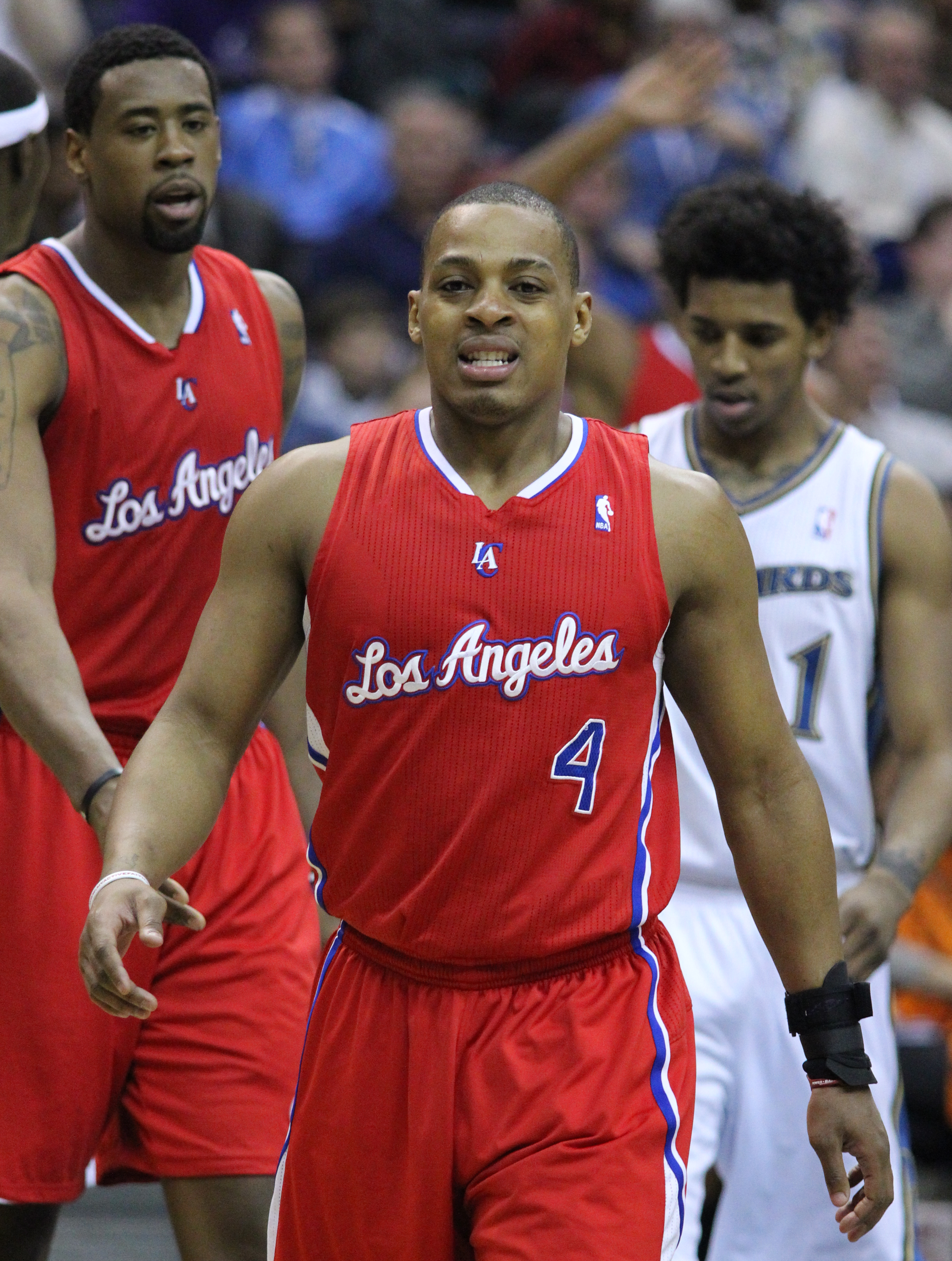 Wizards v/s Clippers 03/12/11